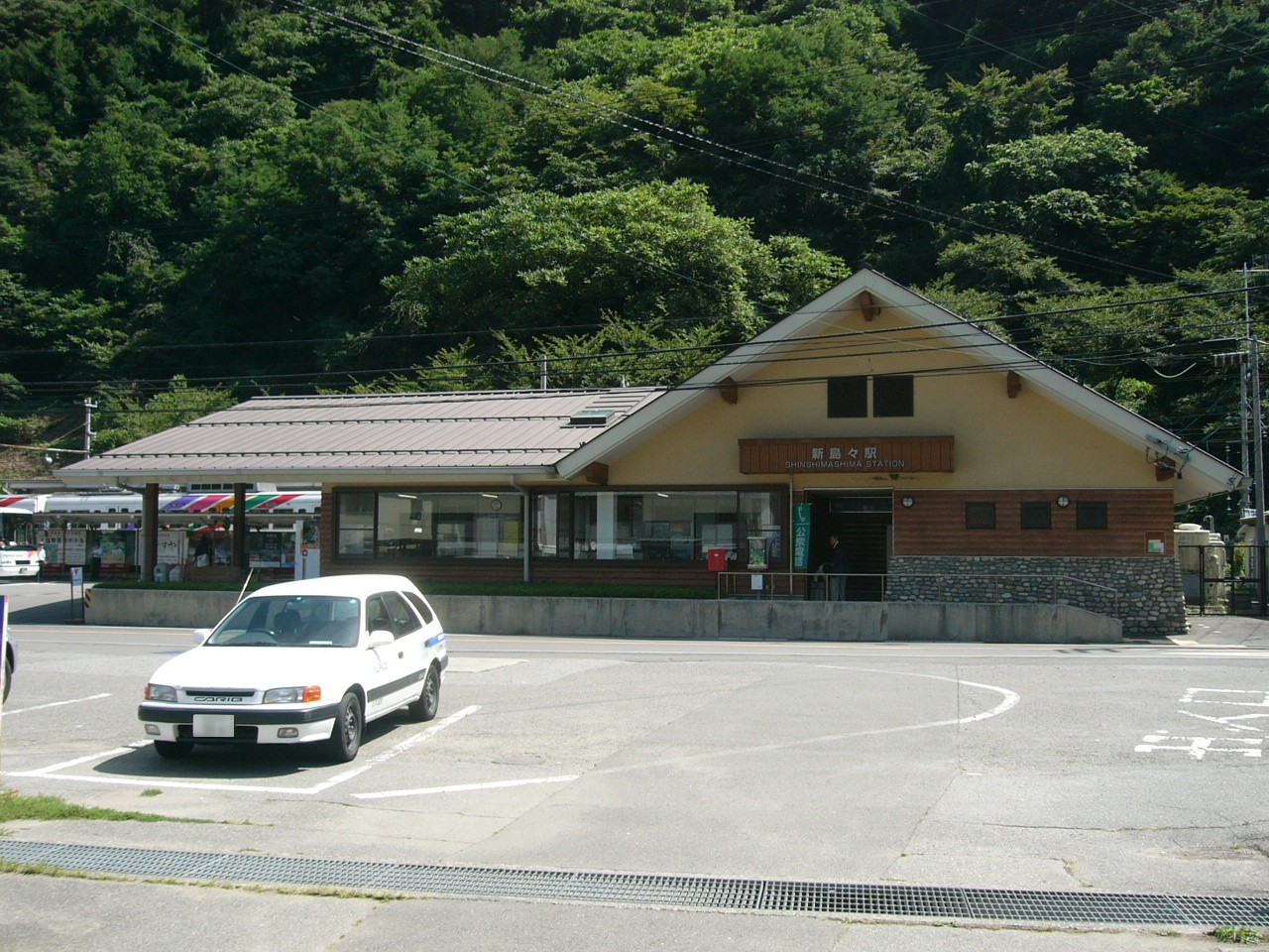 Shinshimashima Station